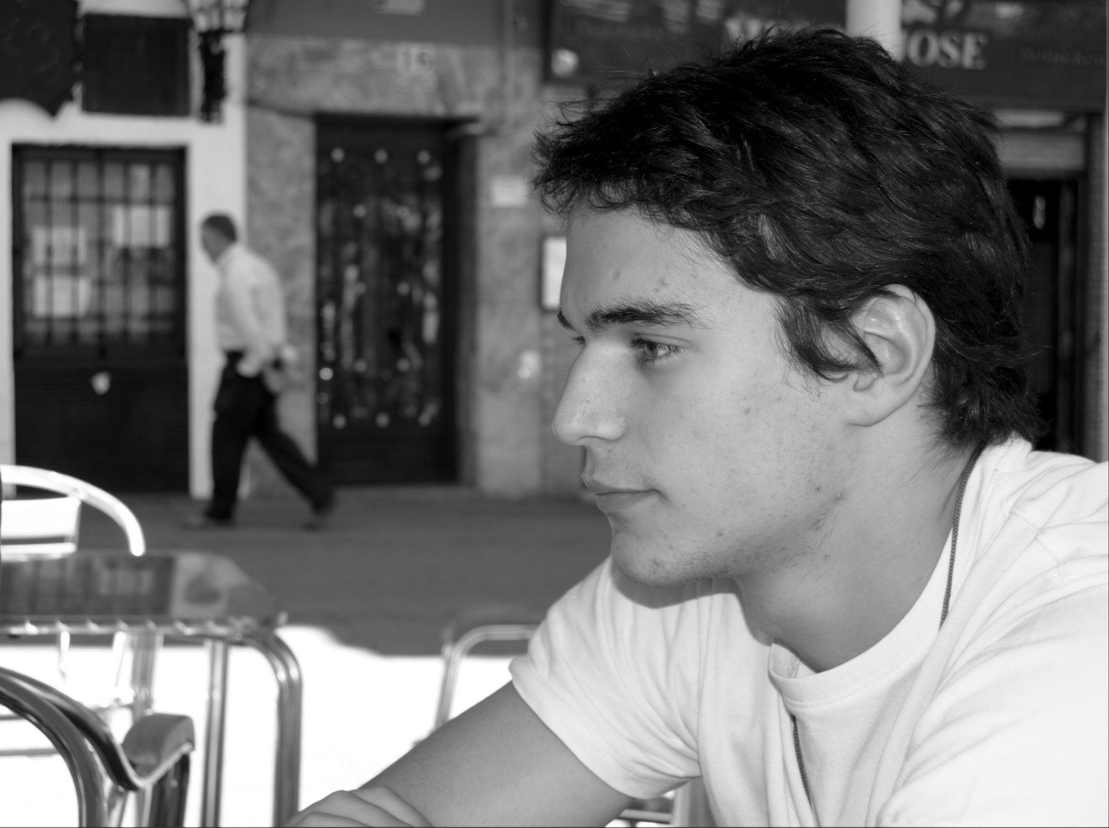 Jorge Pavón, hispana esperantisto